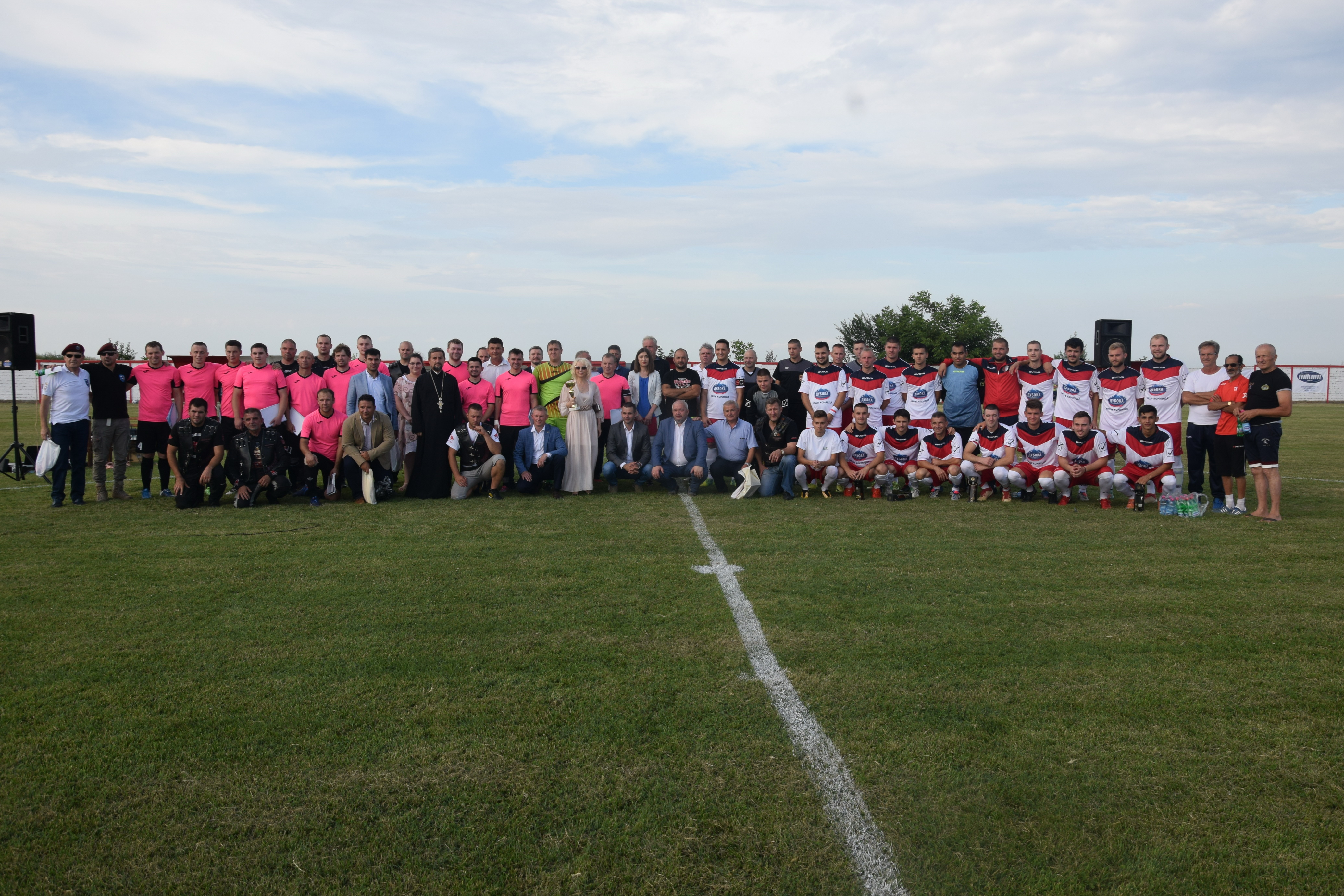 Српски (ћирилица): Пријатељска утакмица